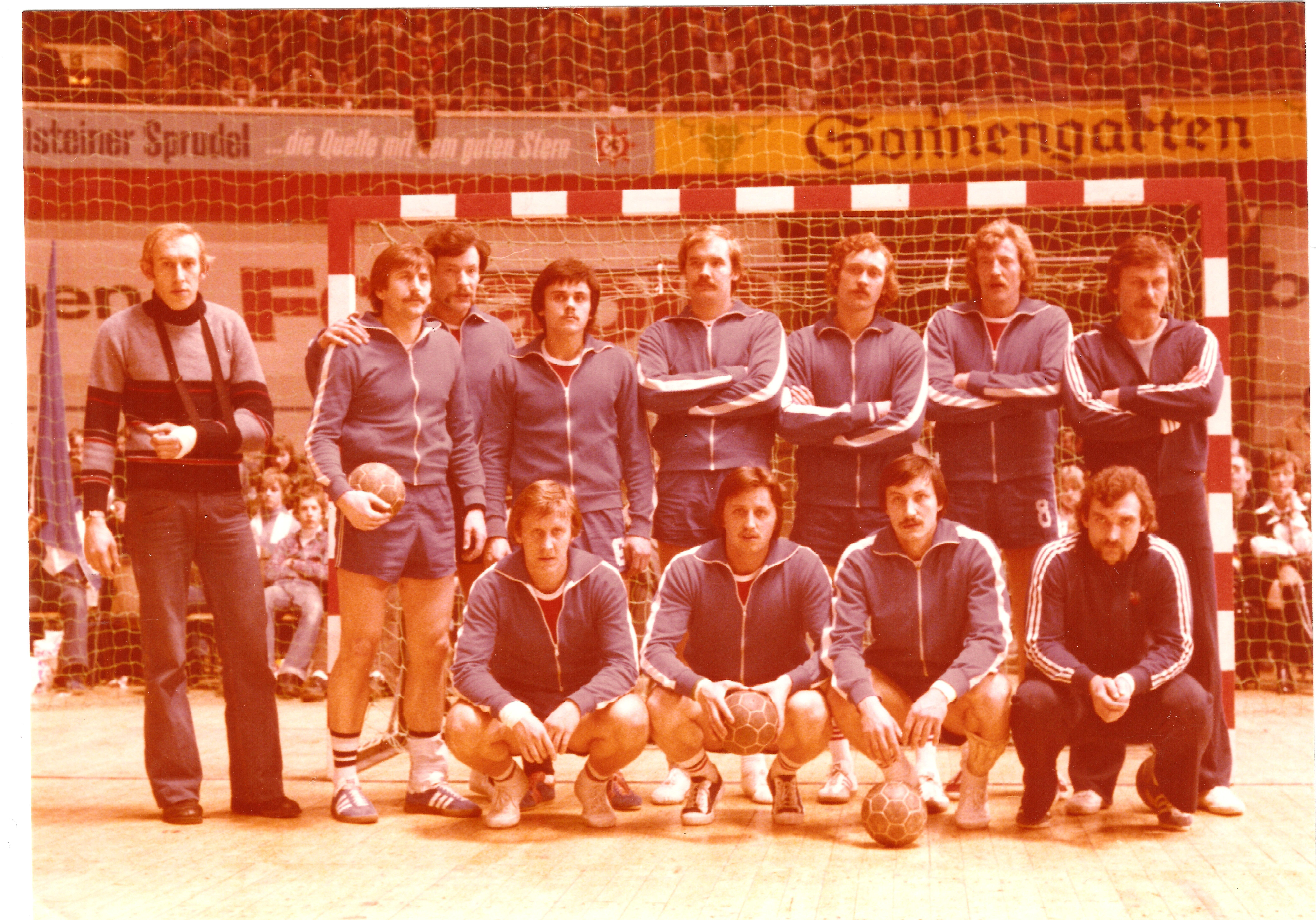 VFL Gummersbach - Anilana Lodz Westfallenhalle Dortmund 1978